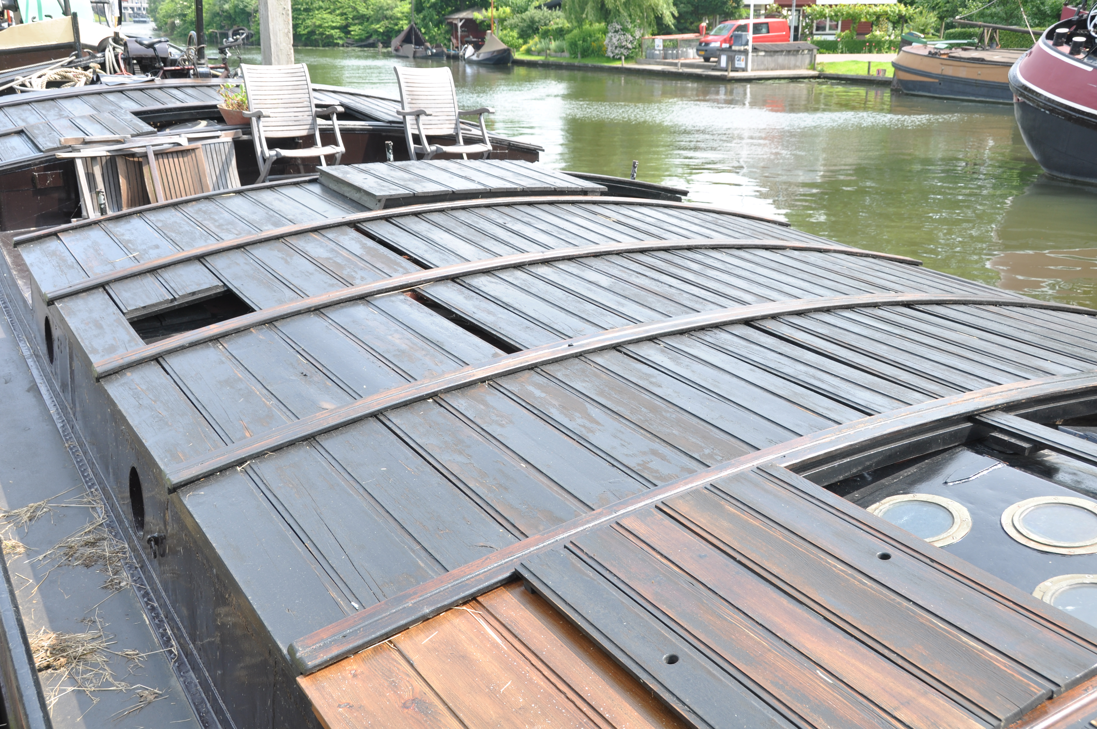 De VERANDERING voor de wal in de museumhaven aan de Ondervloed in Gorinchem.